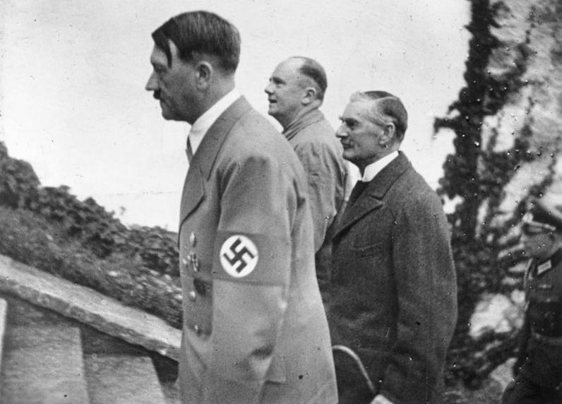 Premierminister Chamberlain beim Führer Am Donnerstag stattet der englische Premierminister dem Führer auf dem Obersalzberg einen Besuch ab. UBz: Adolf Hitler mit dem englischen Gast, dazwischen Gesandtschaftsrat Dr. Schmidt. Scherl Bilderdienst, Berlin 16.9.1938 12279-38